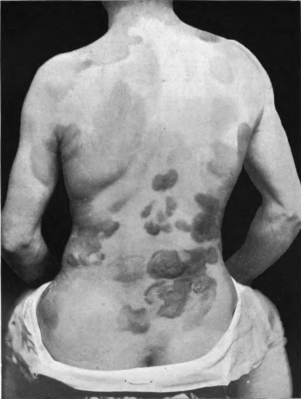 Mycosis Fungoides